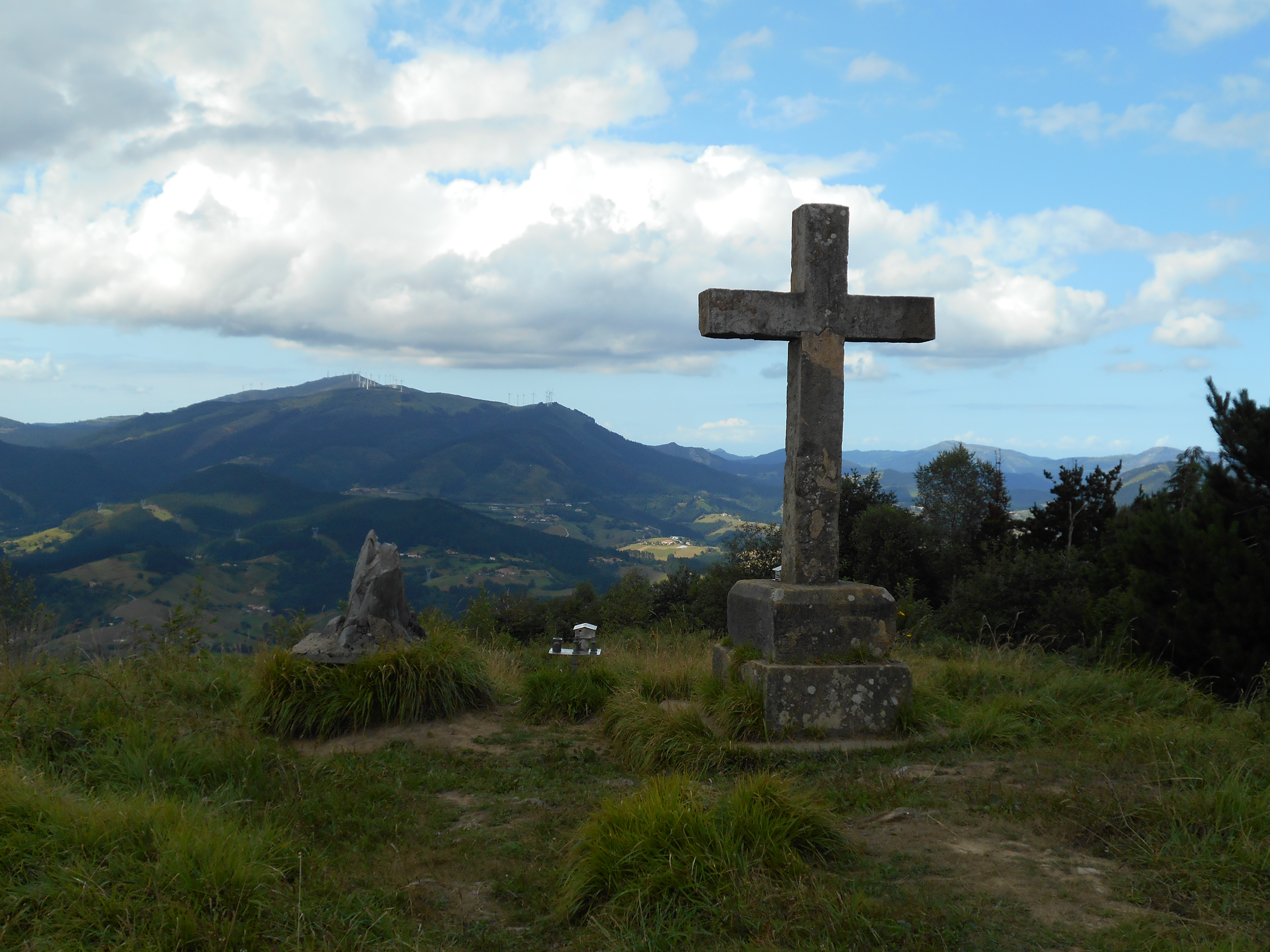 Cruz en la cima norte del monte Santamañazar